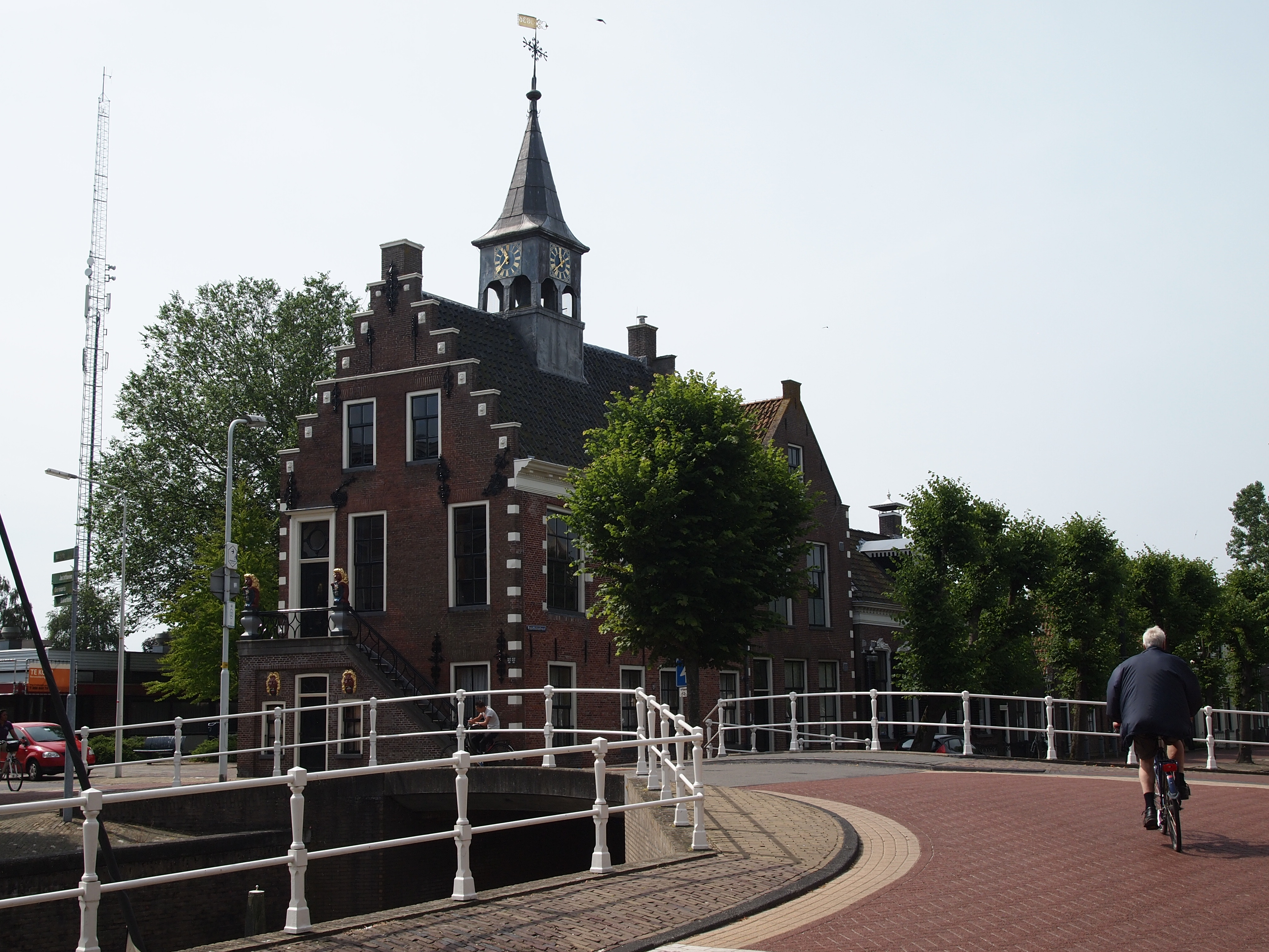 Raadhuis aan deRa Raadhuisstraat